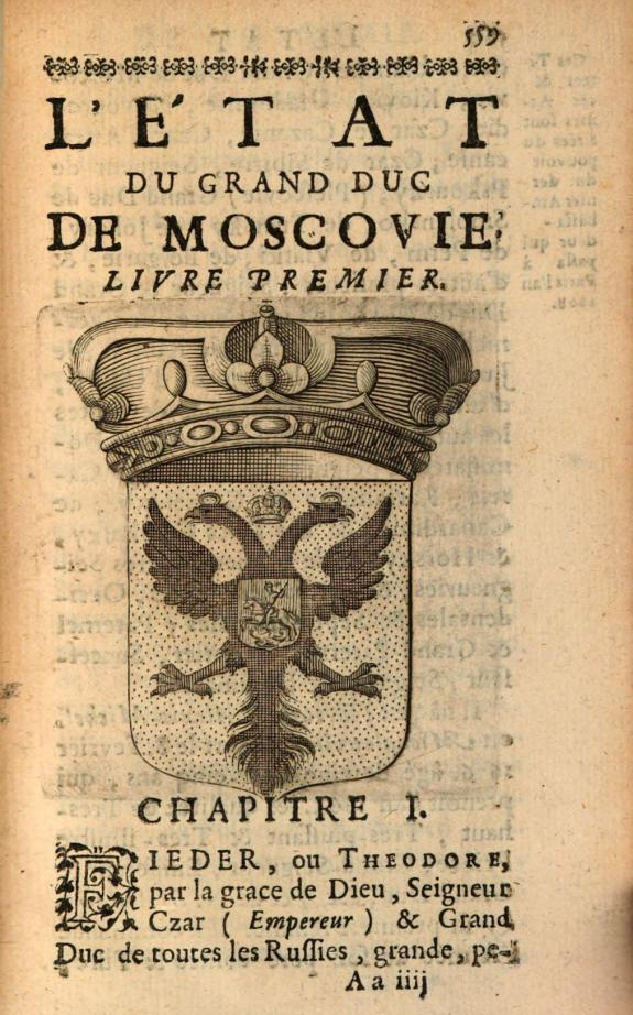 Герб Фёдора Алексеевича царя и великого князя Всея России из книги Pierre Scévole de Sainte Marthe "L'état de l'Empire, d'Angleterre, de Dannemarc, Suede, Pologne, et Moscovie", Paris, 1680.